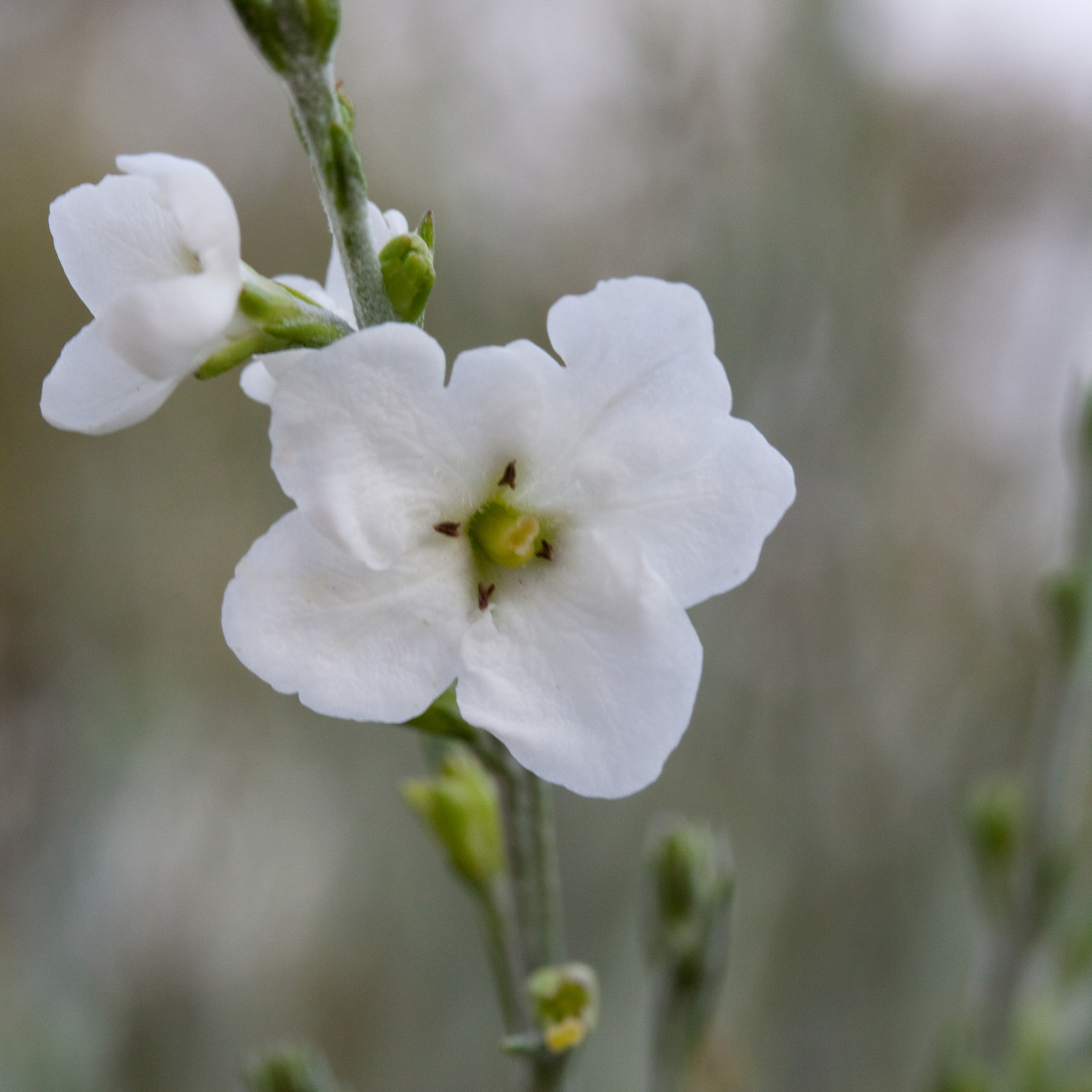 Fleurs de Gomphostigma virgatum - Jardin des Plantes - Paris - France